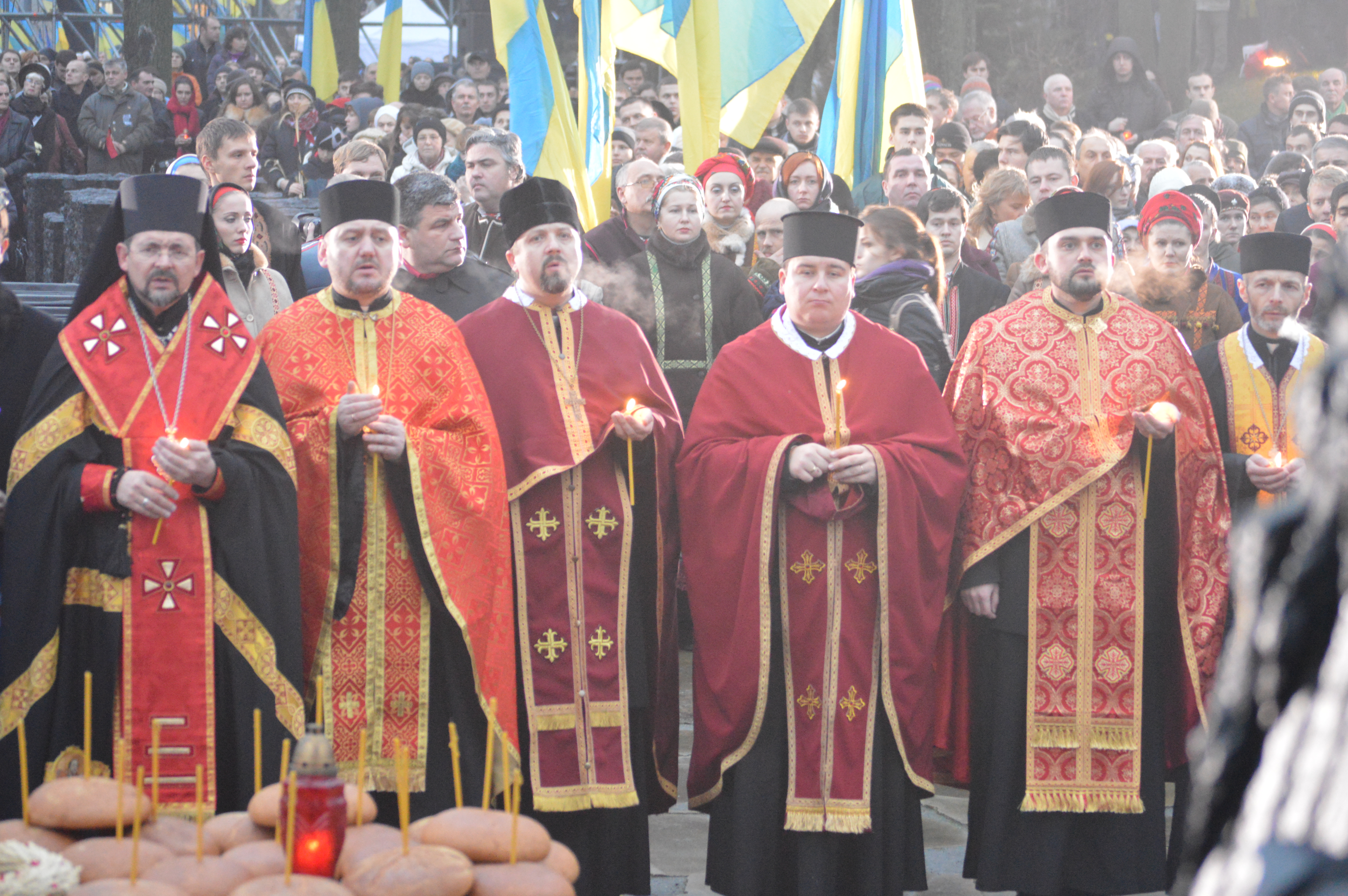 Фото заупокойной службы на территории Мемориала "Жертвам Голодоморов 1932-33 годов в Украине"